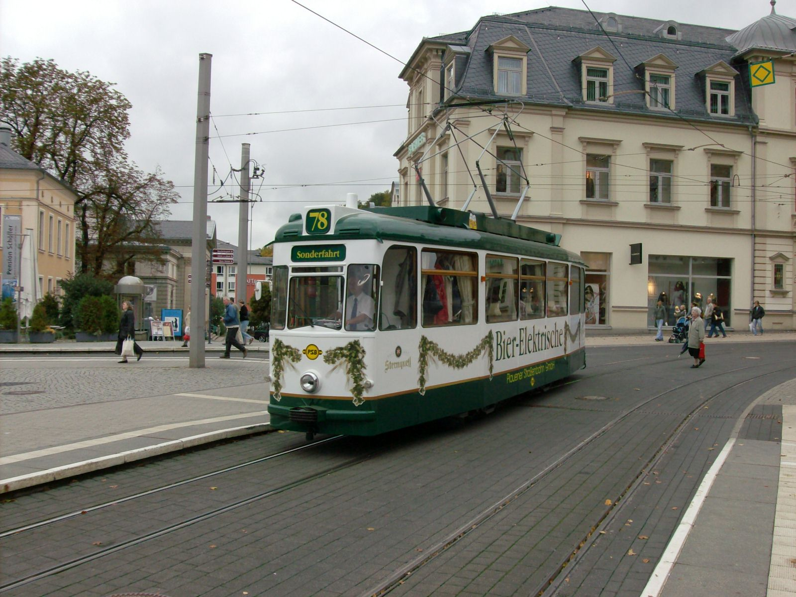 HTw 78 an der Zentralhaltestelle Tunnel, Plauen